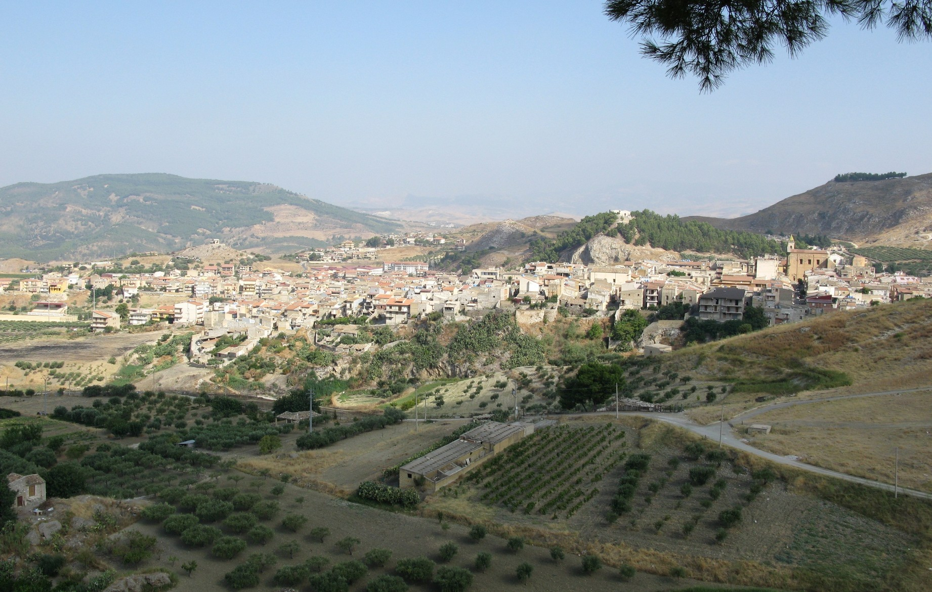 Panorama di Cattolica Eraclea.